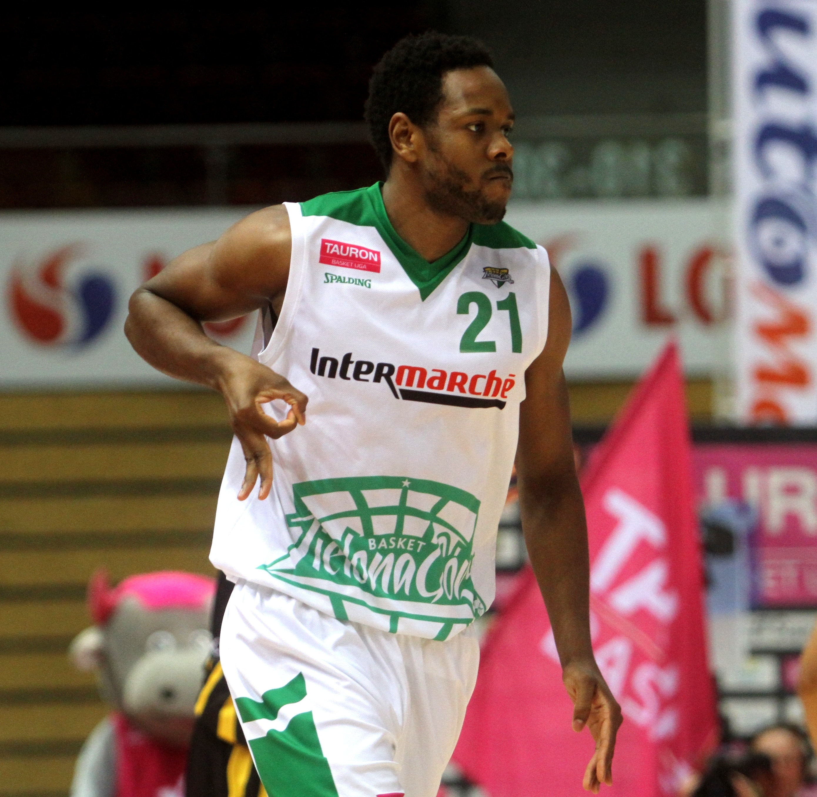 Craig Brackins Stelmet Zielona Góra